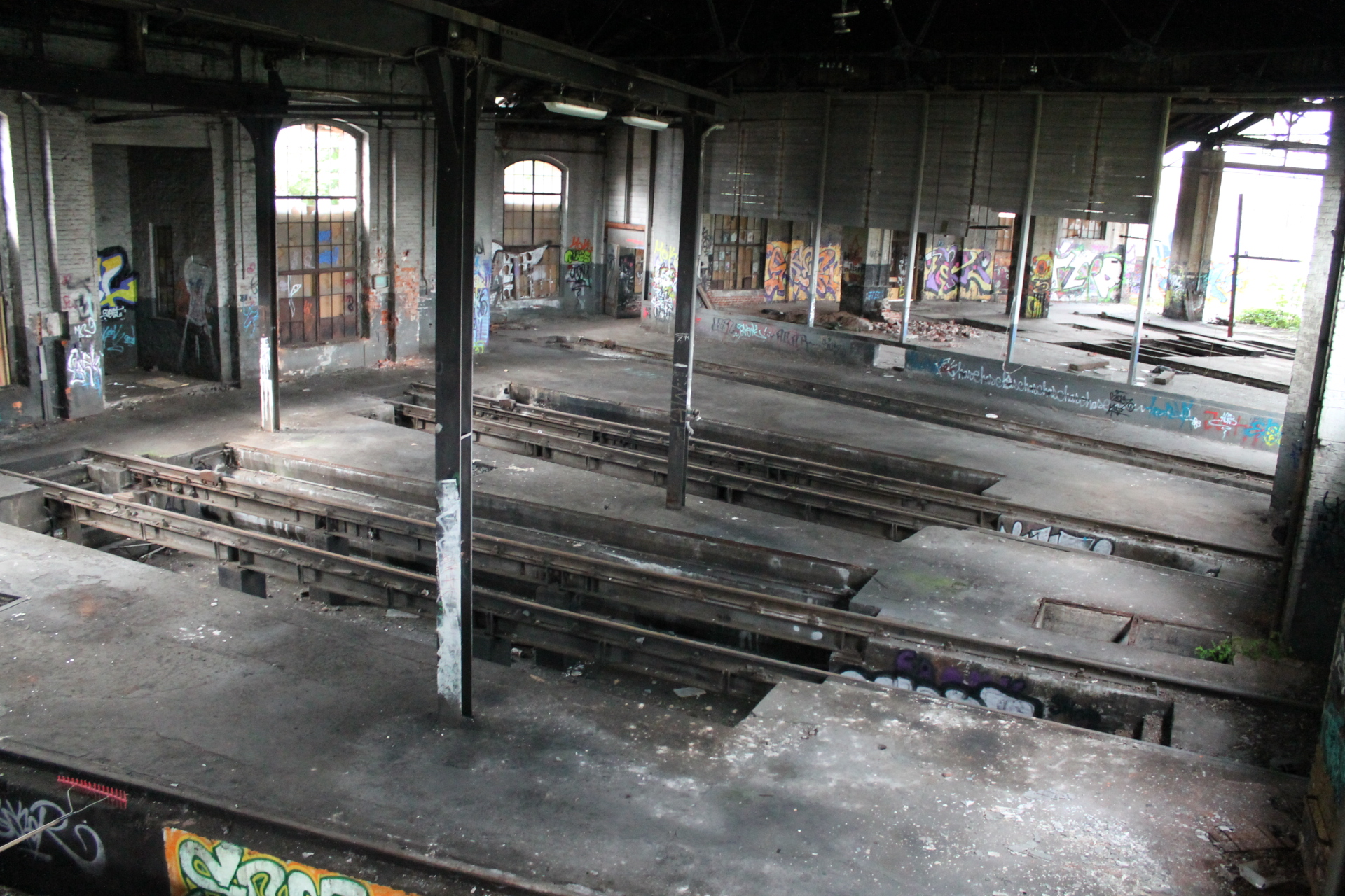 Im Lokschuppen existieren Gruben in denen man die Loks von unten besichtigen und reparieren kann.